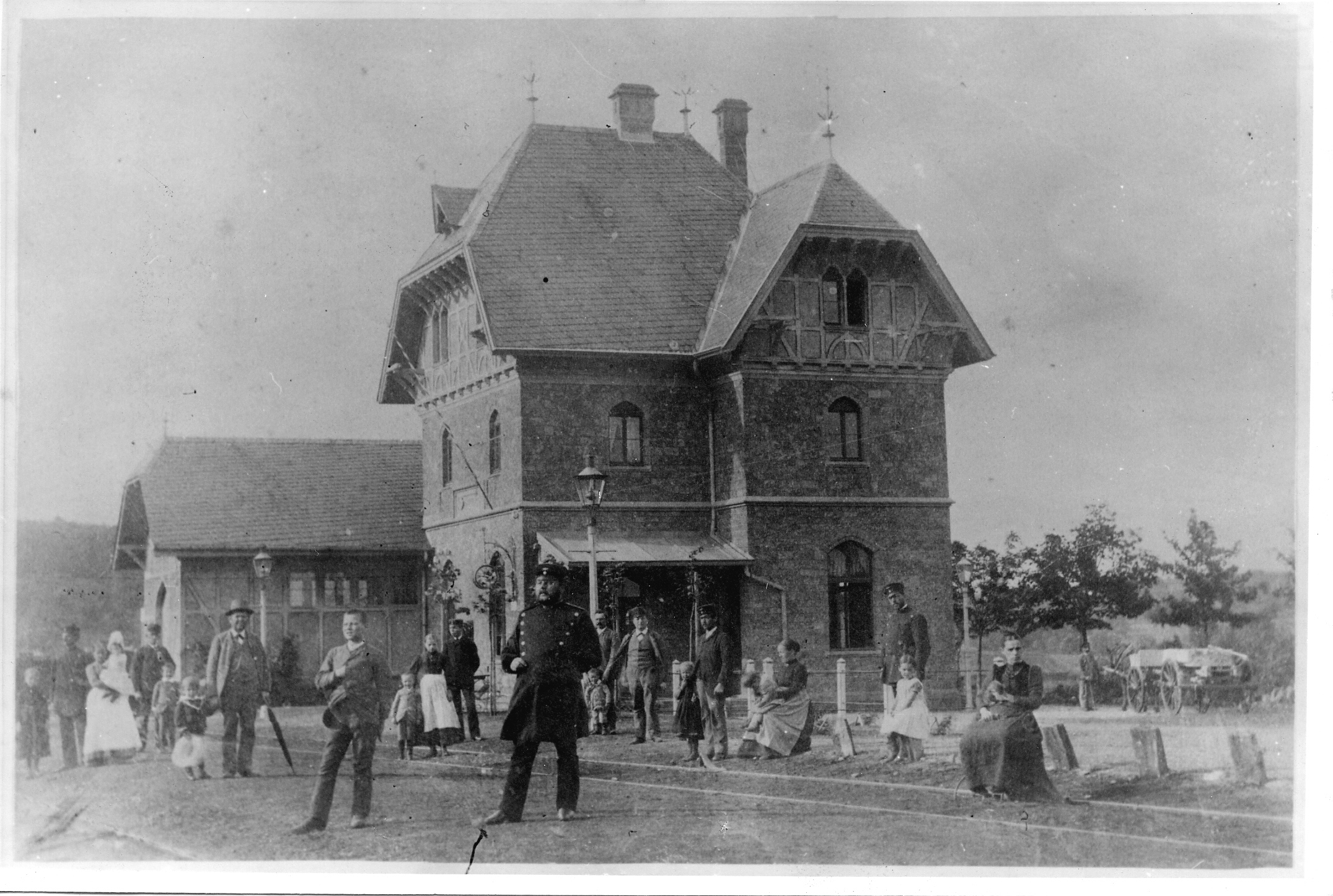 Der Bahnhof Kottenheim (Landkreis Mayen-Koblenz, Rheinland-Pfalz) an der Eifelquerbahn im Jahre 1892. Zu sehen sind: Nikolaus Pickel und Gustav Lung, ganz links: Linnewewersch Kathsche (Bell), auf dem Arm: Gritsches Hilda Lung.